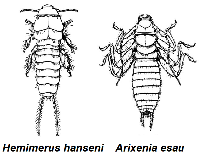 Hemimerus hanseni, Earwig, Dermaptera Arixenia esau, Earwig, Dermaptera